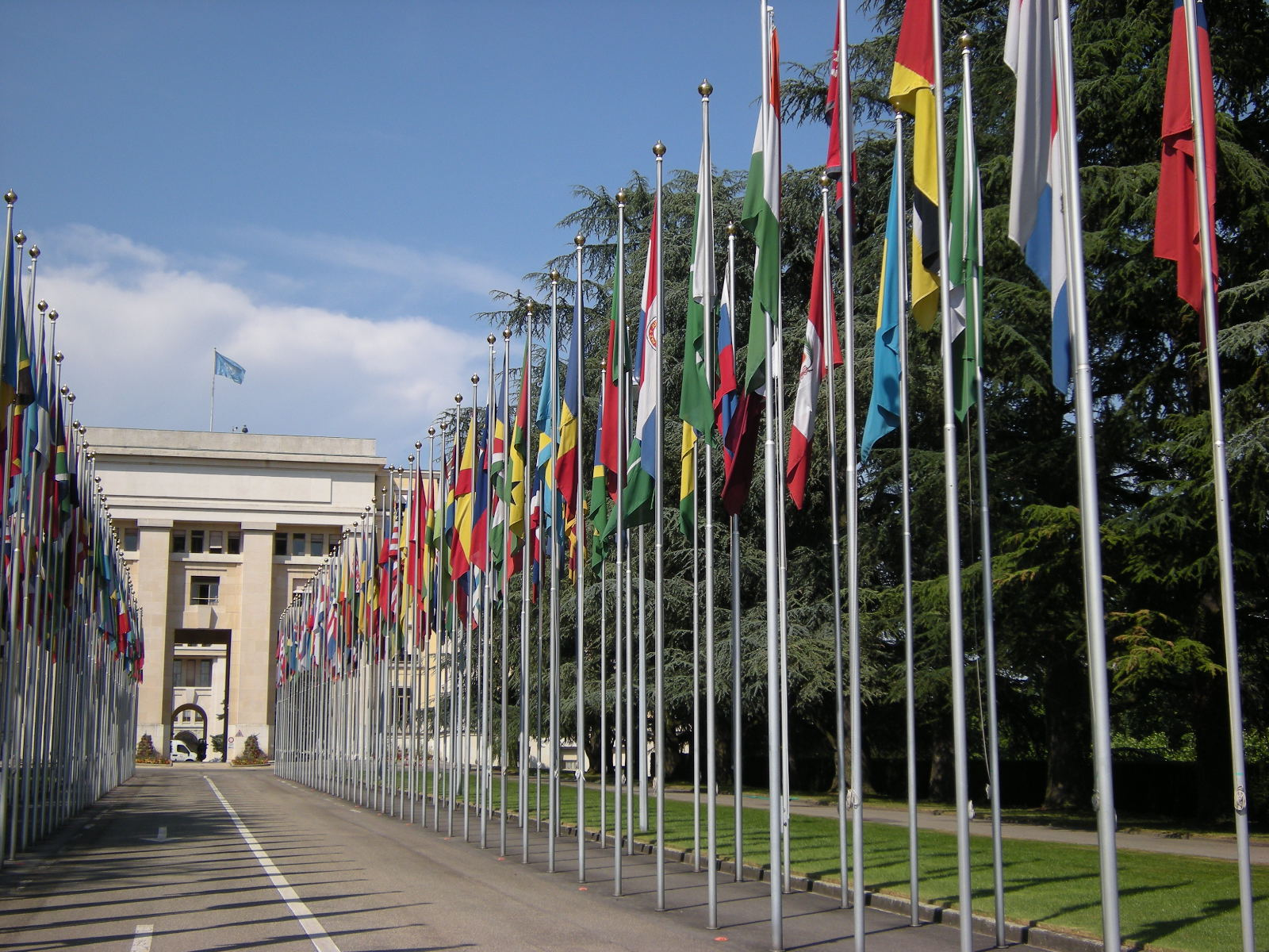 Sede européia das Organização das Nações Unidas (ONU)